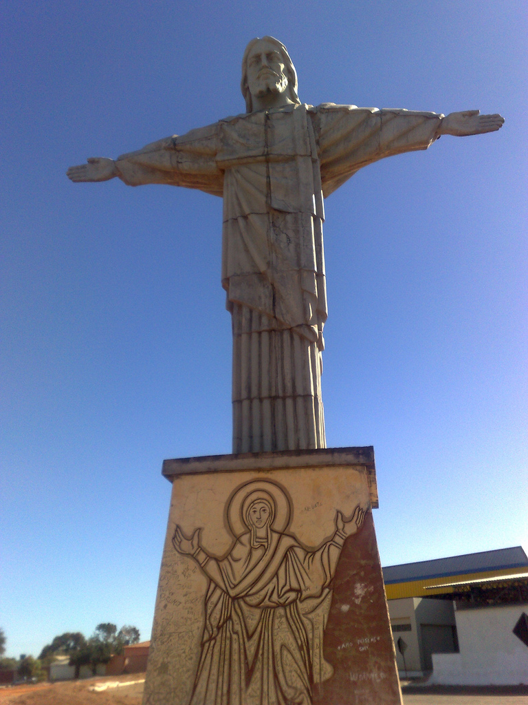 Estátua de Cristo em Luziânia-GO